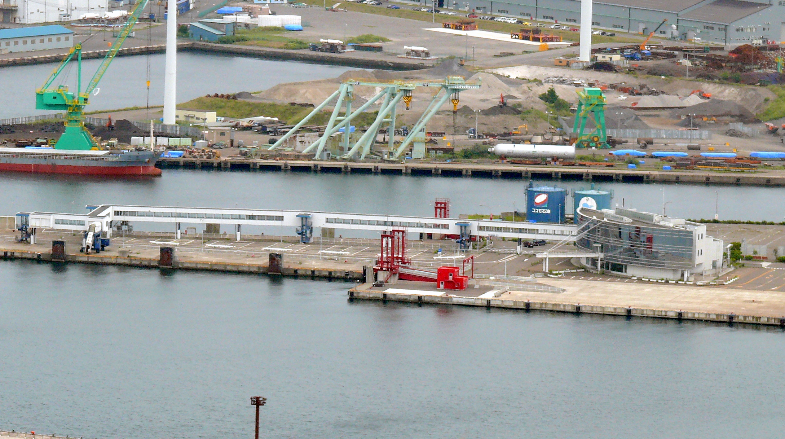 室蘭フェリーターミナルを測量山山頂より望む。